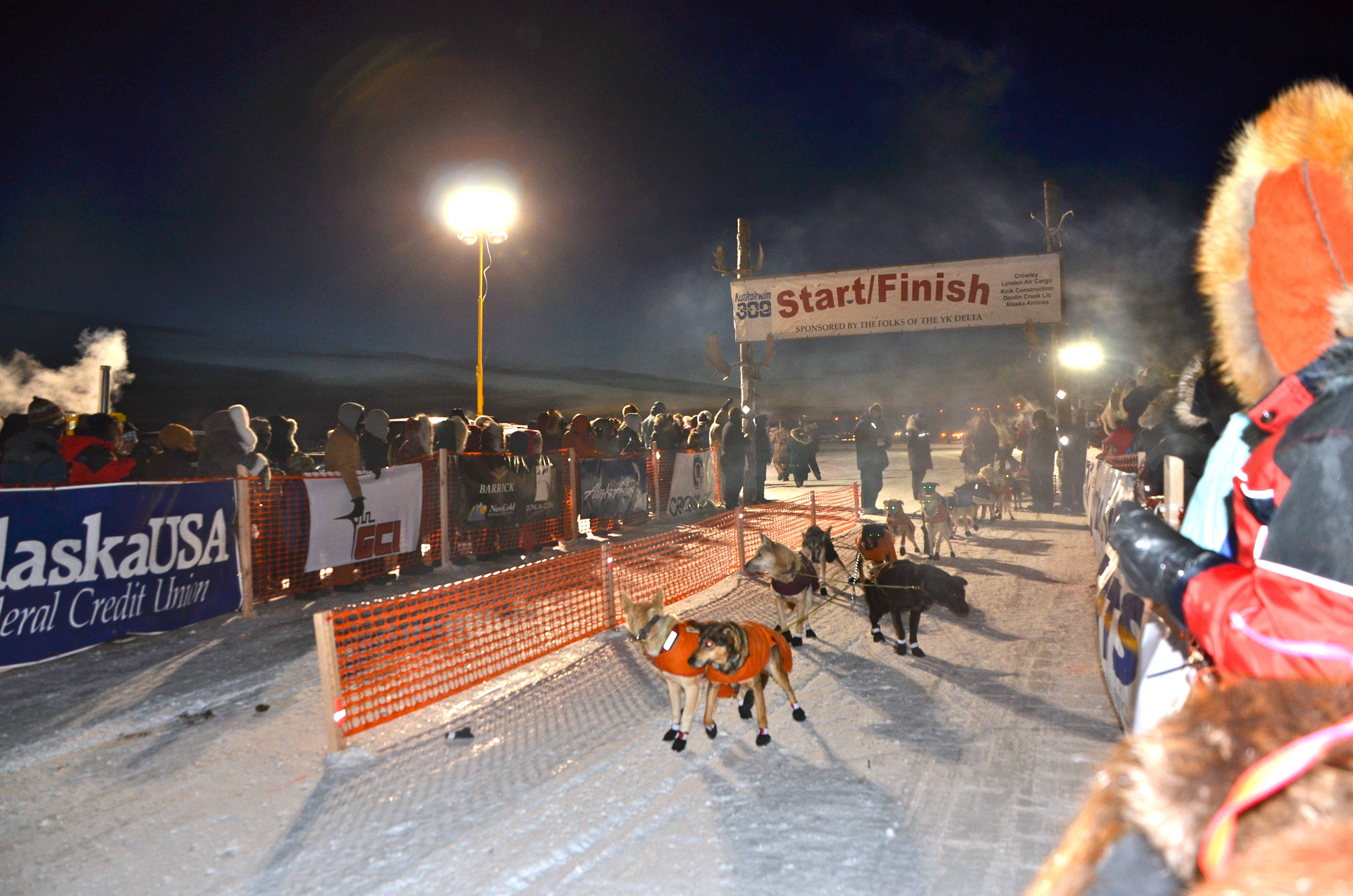 Starting line-Kuskokwim 300 sled dog race, Bethel, Alaska